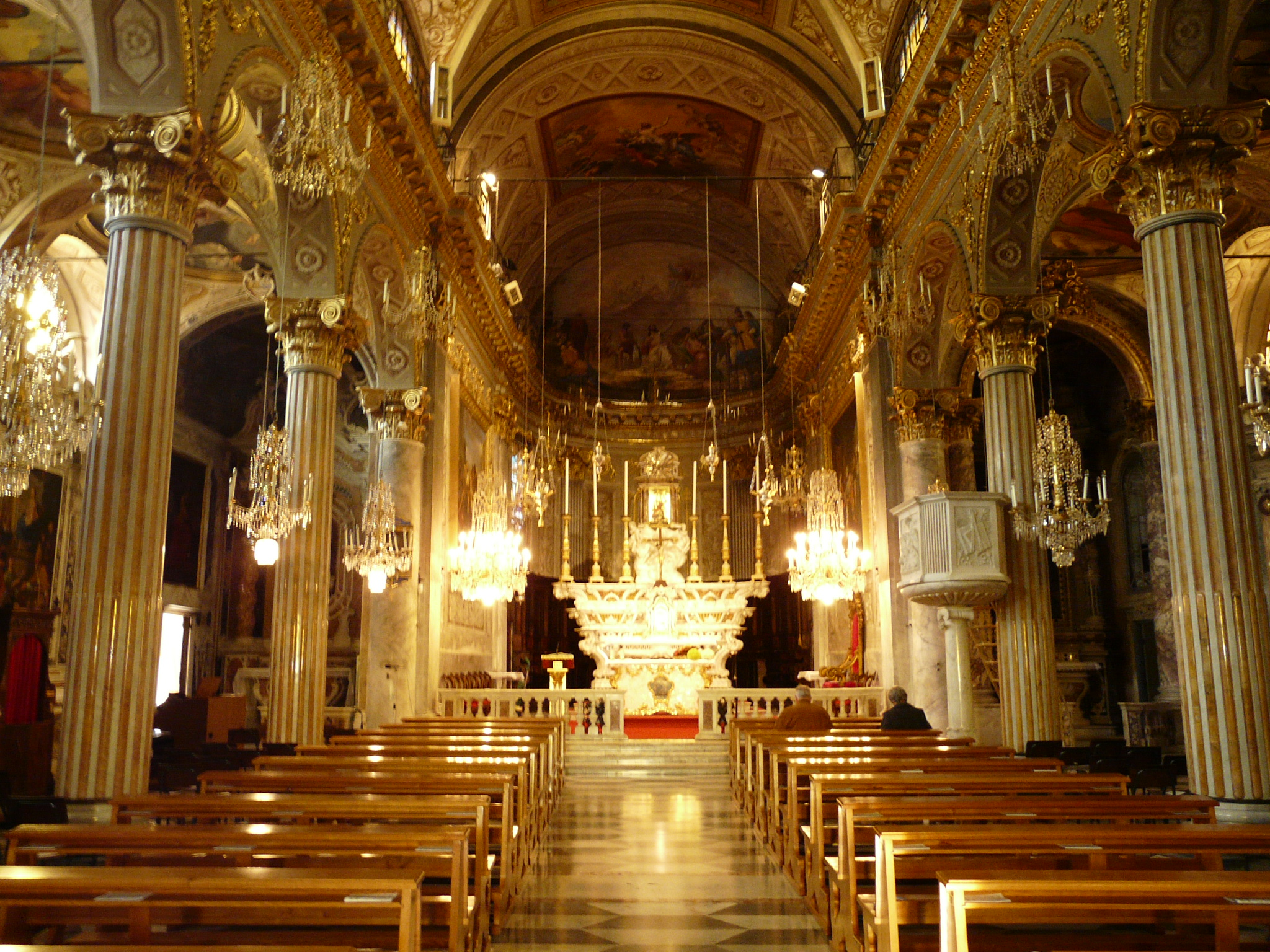 Navata centrale del Santuario di Nostra Signora della Lettera, Santa Margherita Ligure, Liguria, Italia